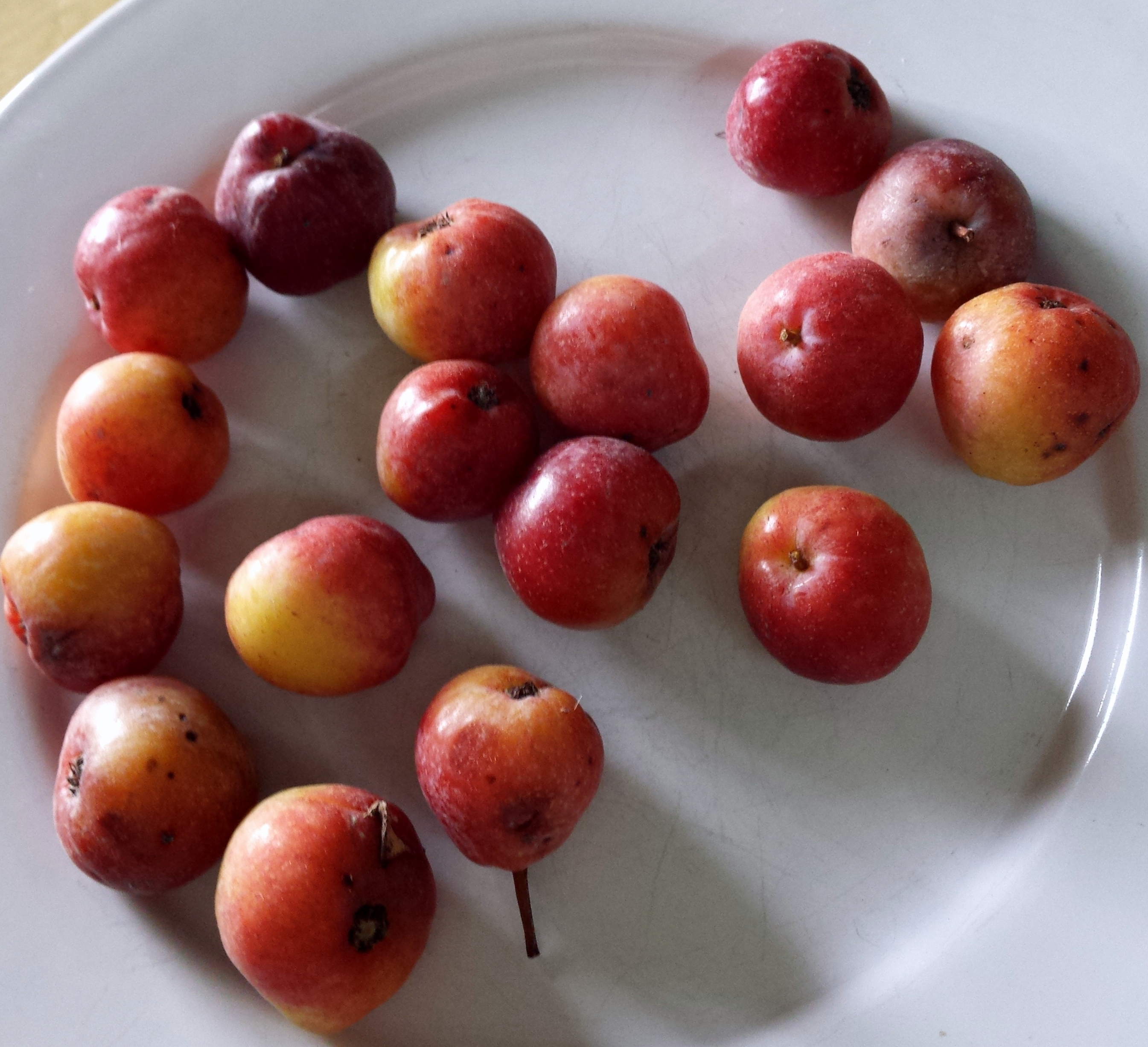 Serbes, els fruits de Sorbus domestica, de Castelltallat, Bages